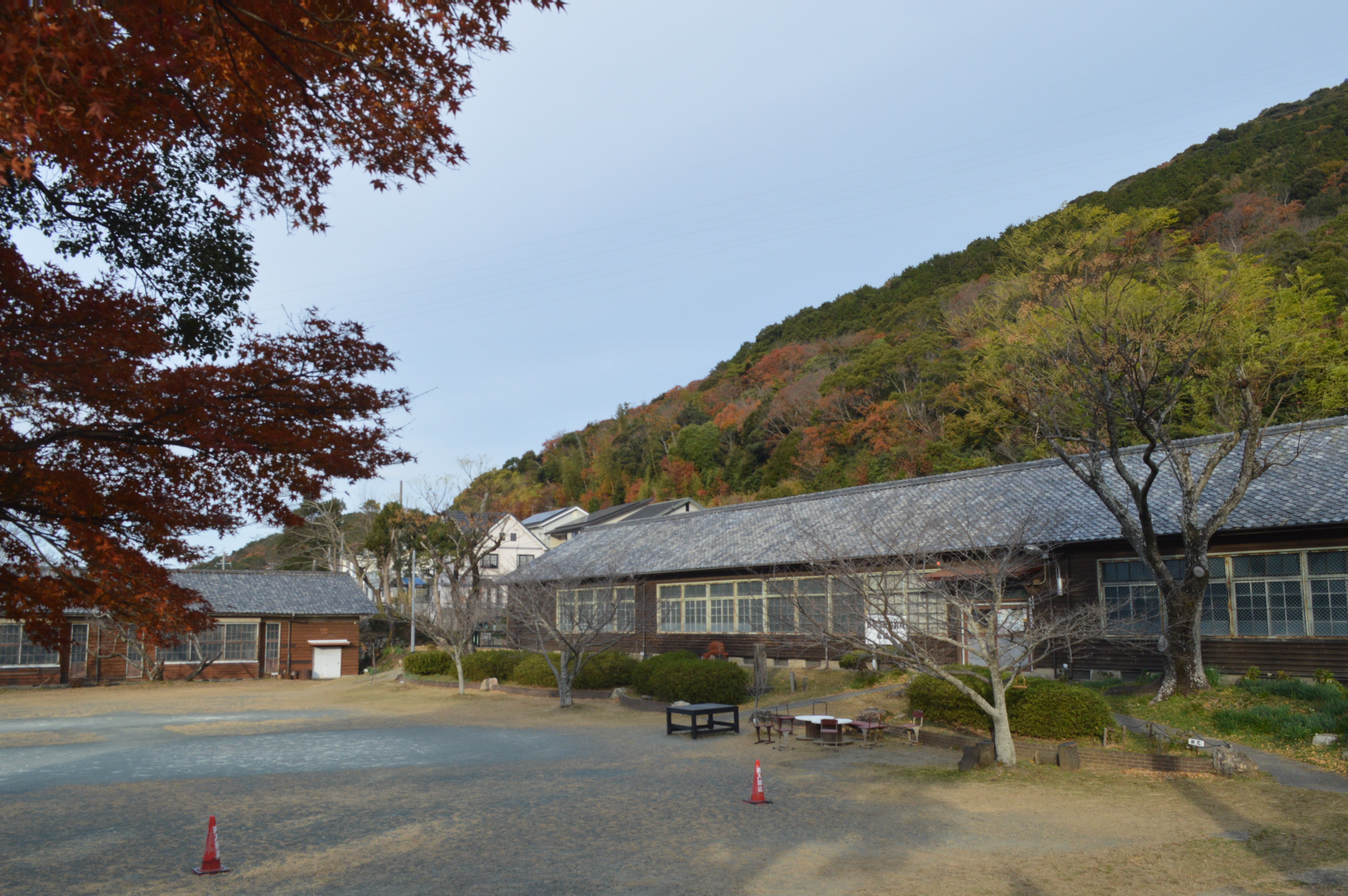 愛知県豊橋市多米町滝ノ谷34-1-1にある豊橋市民俗資料収蔵室「ふるため」。豊橋市立多米小学校の旧校舎。登録有形文化財。